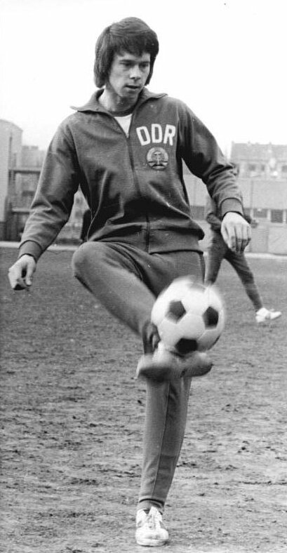 ADN-ZB Mittelstädt 3.5.74 Berlin: DDR-Spieler für die Fußball-Weltmeisterschaft 1974 in der BRD Zum Kandidatenkreis gehört Angriffsspieler Jürgen Sparwasser vom 1. FC Magdeburg.